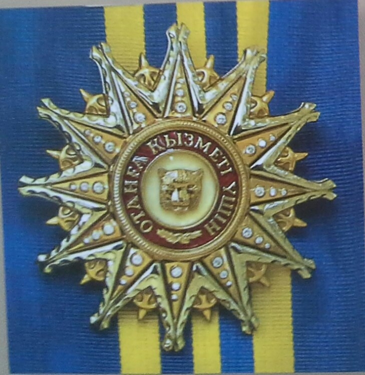 Қазақша (кирил): "Барыс" ордені